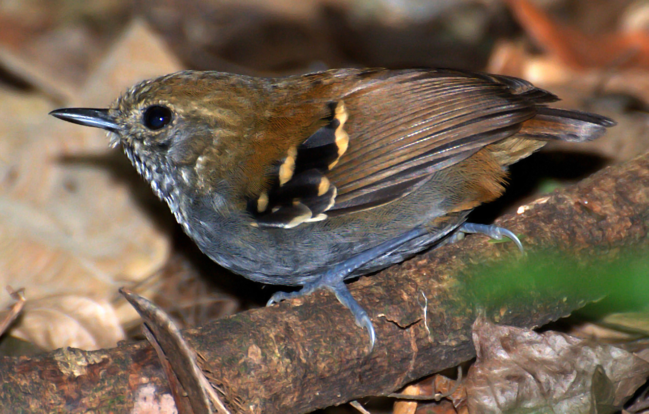 Parque Estadual da Serra da Cantareira - São Paulo-SP - Brasil